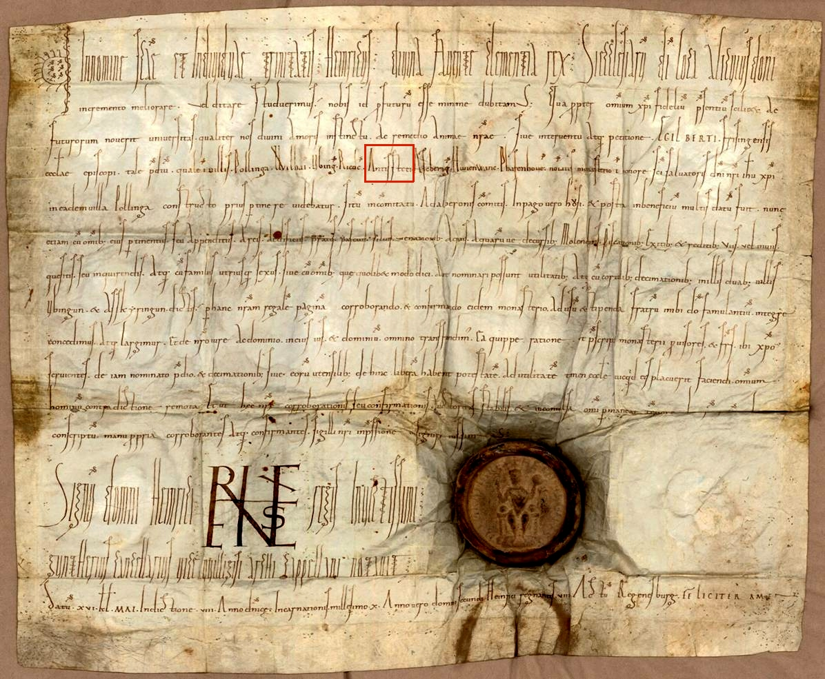 Ersterwähnung Landstettens (Antissteti) in der Stiftungsurkunde Heinrichs II. vom 16. April 1010. (Text der Stiftungsurkunde befindet sich auf der Diskussionsseite der Datei.)